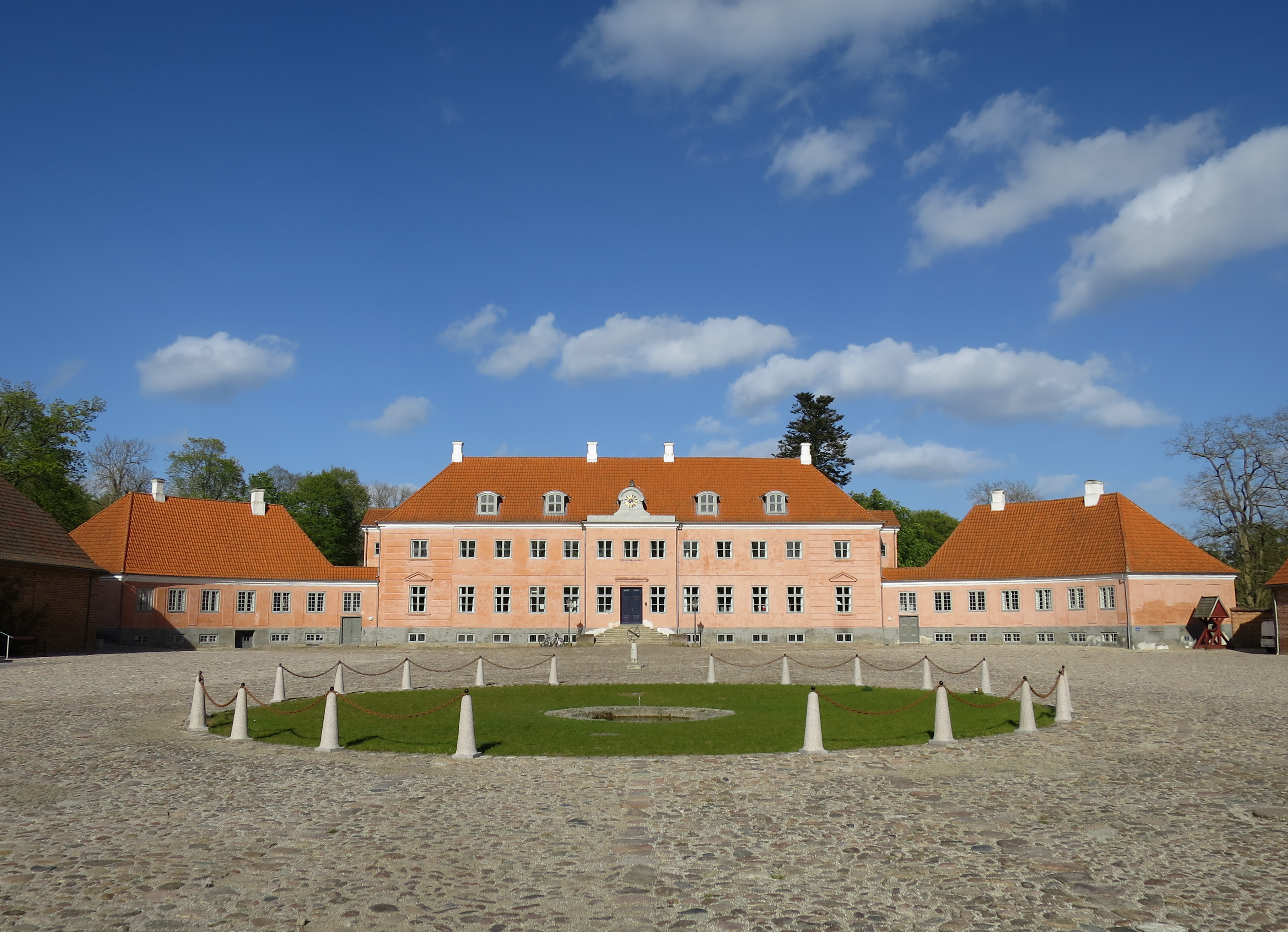 Den nuværende hovedbygning på Moesgård er opført i 1780-1784.